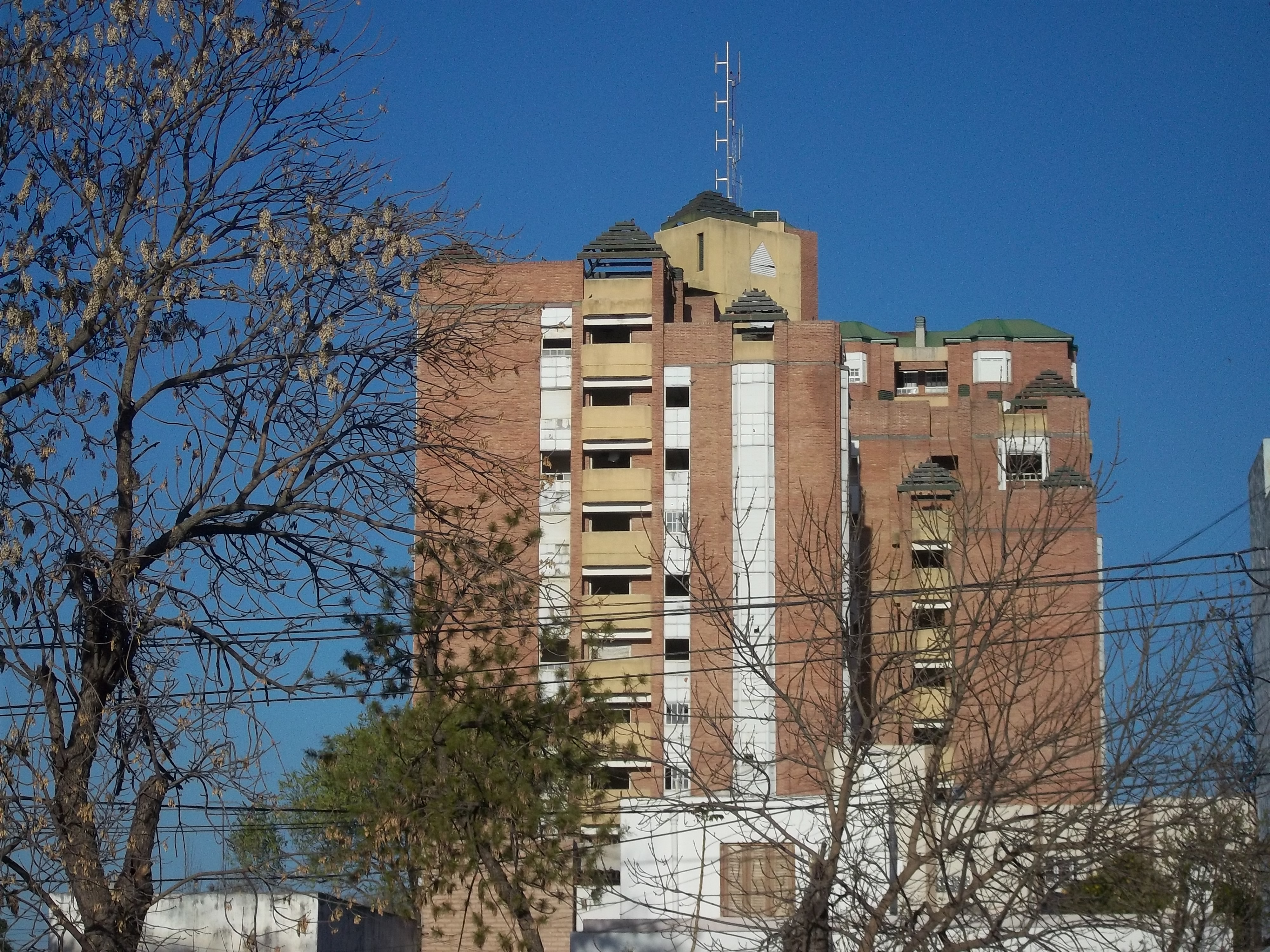 Villa Mercedes San Luis Argentina